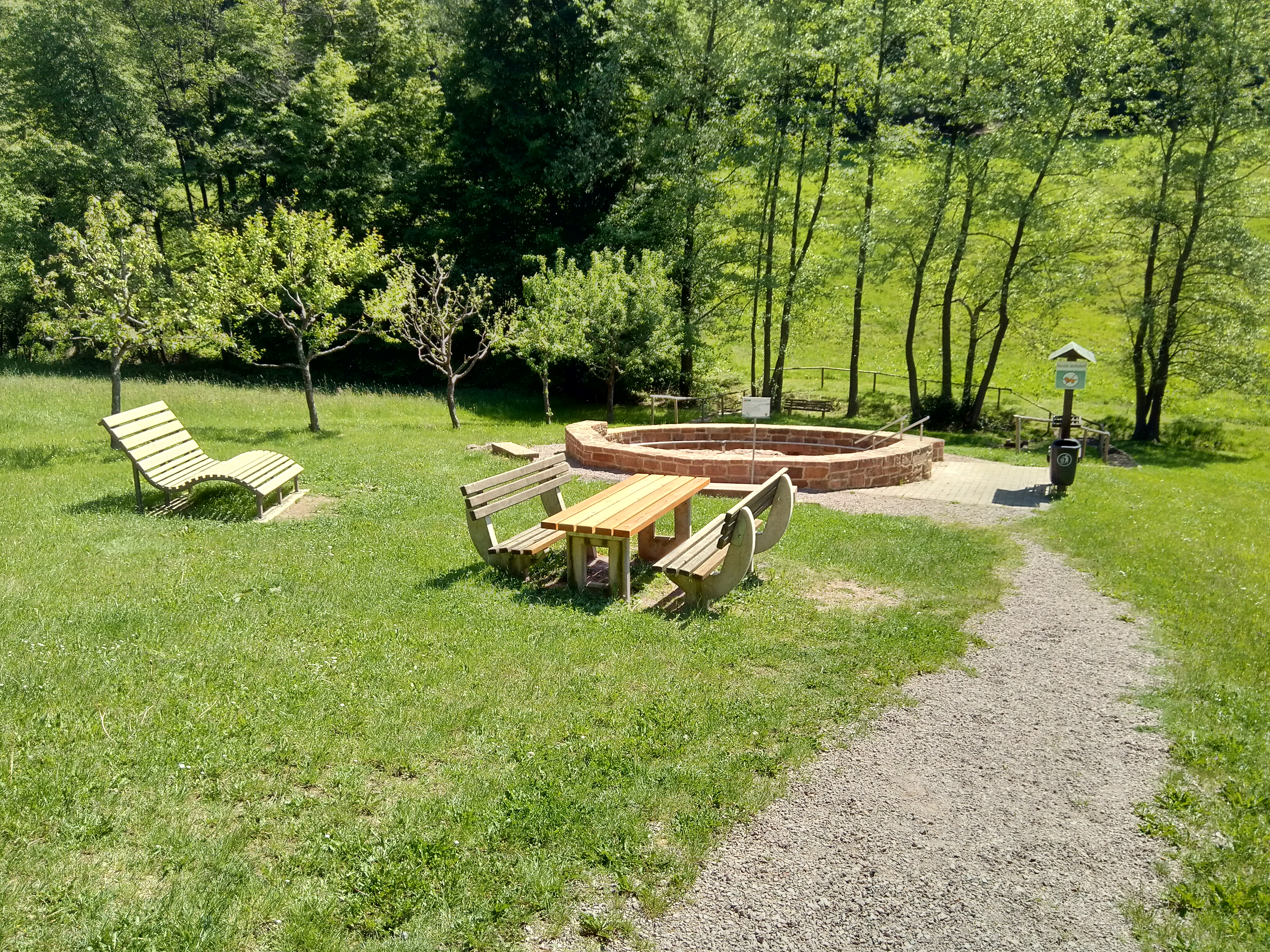 Wassertretanlage Leidersbach (Ortsteil Ebersbach) mit Barfußpfad